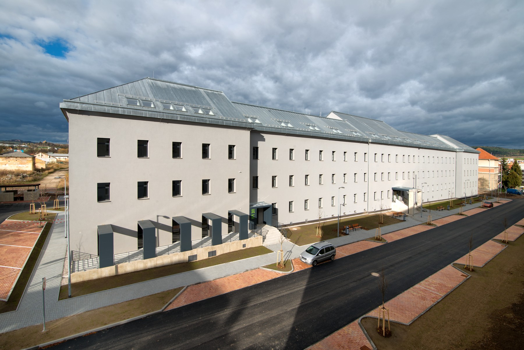 Budova Technologického centra Písek